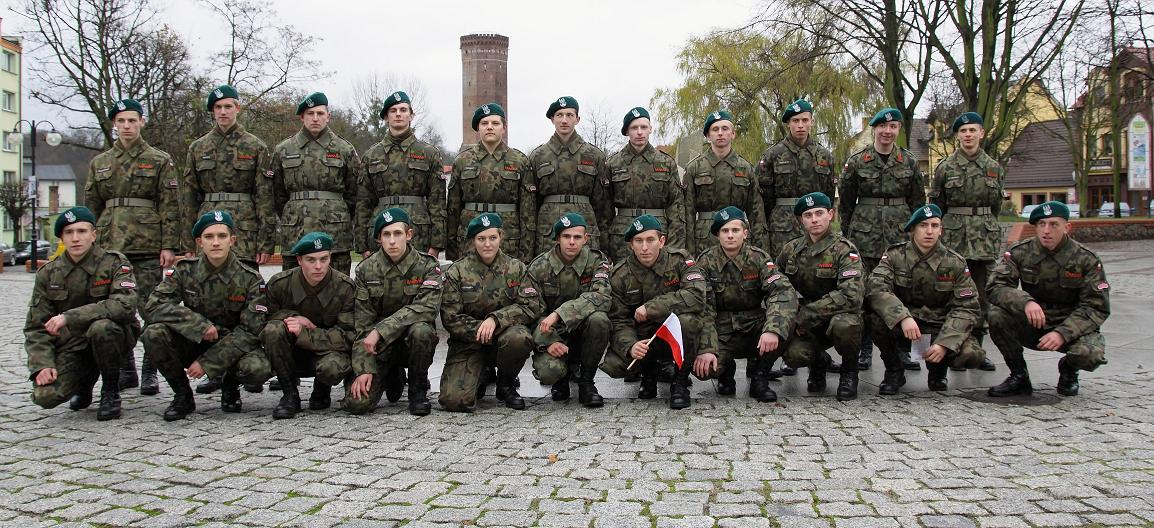 Jednostka Strzelecka 4039 Człuchów (Związek Strzelecki "Strzelec" OSW) na rynku w Człuchowie podczas obchodów dni Niepodległości 11 Listopada 2010 roku